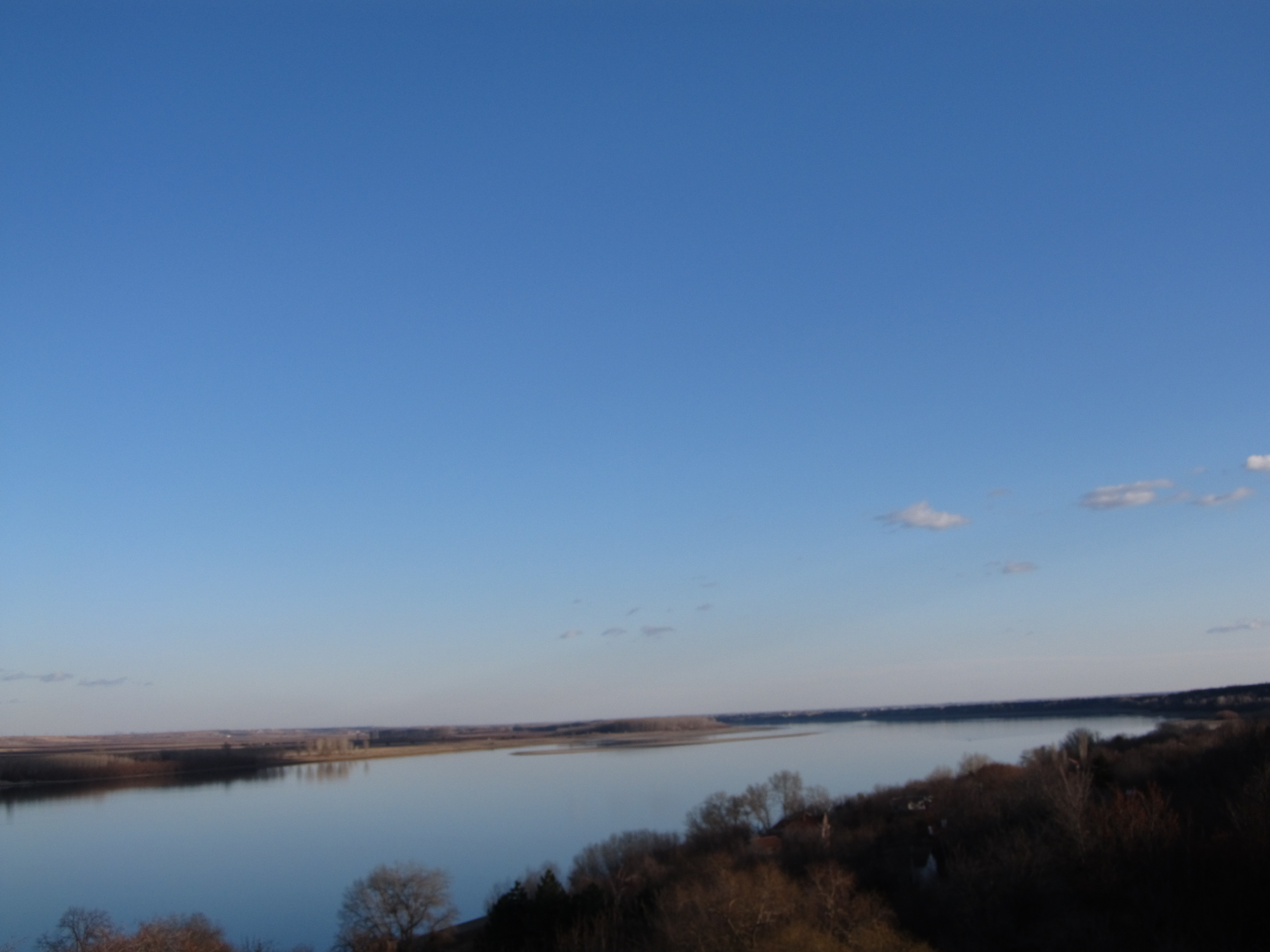 Село Ясен, Област Видин